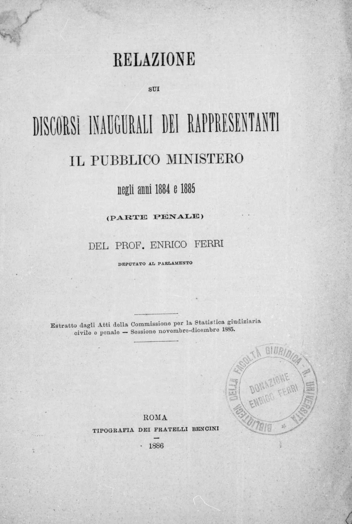 Frontespizio